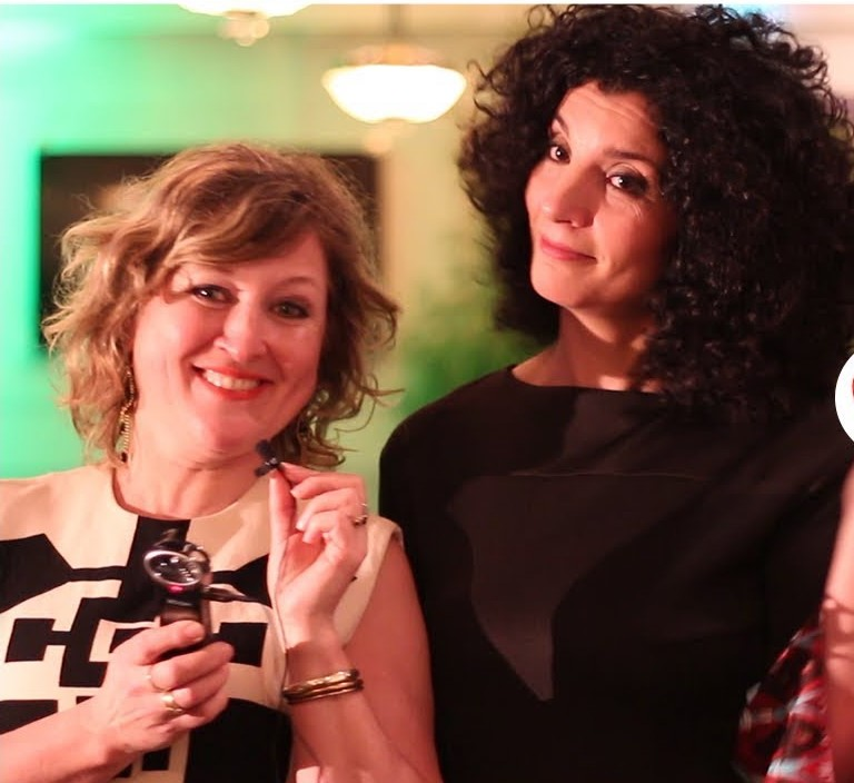 BOEKENTIPS IN 1 MINUUT – "De smaken uit het Midden-Oosten zijn niet alleen verrukkelijk, maar ook nog heel makkelijk." – Nadia Zerouali & Merijn Tol, 43 & 46, culinair schrijfduo, Almere